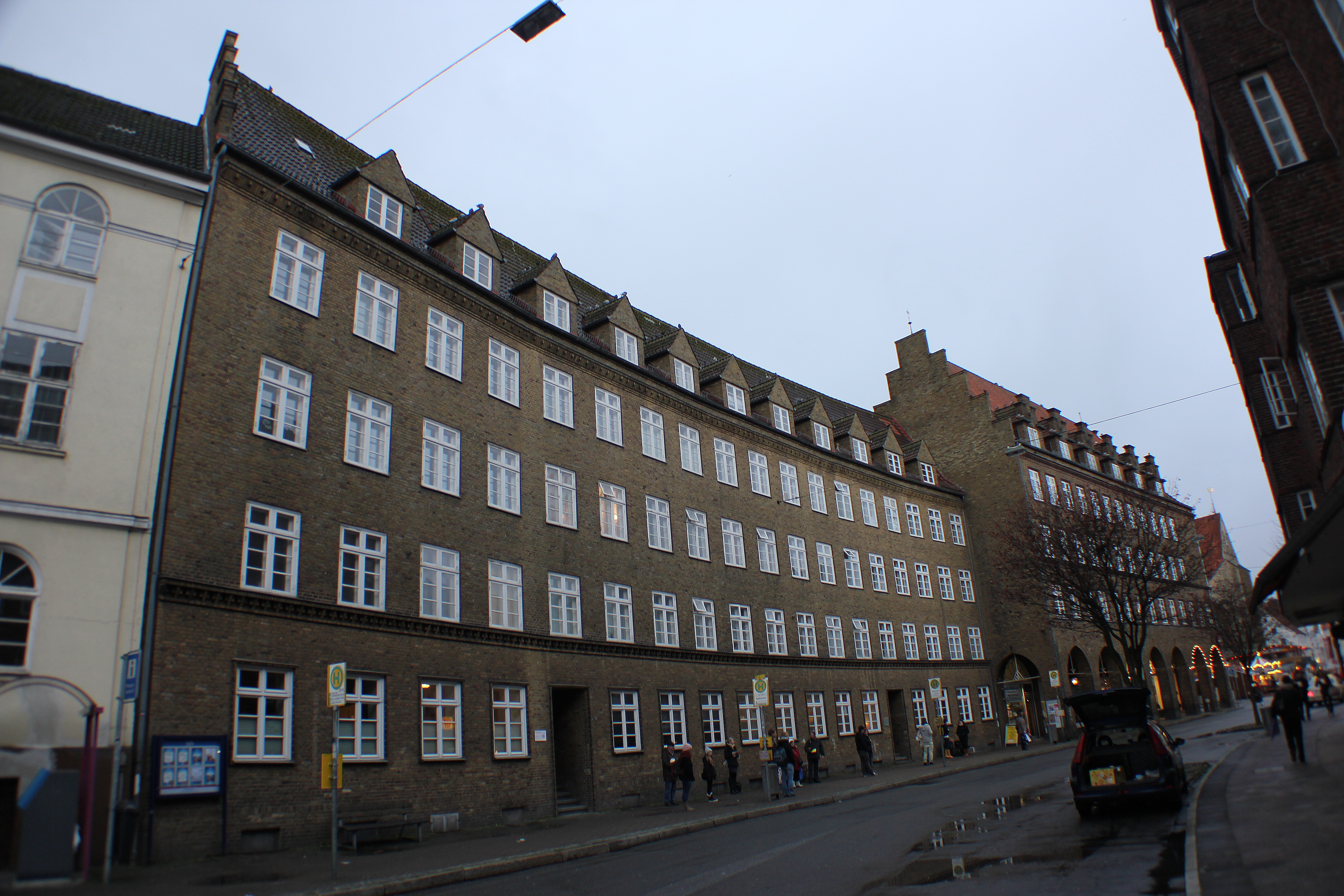 Dr. Todsen Straße, Flensburg, Dr.-Todsen-Straße 2-4, mit Eckhaus Südermarkt 7 von Paul Ziegler